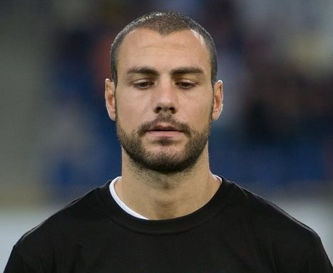 Джаба Канкава під час виступів за Дніпро